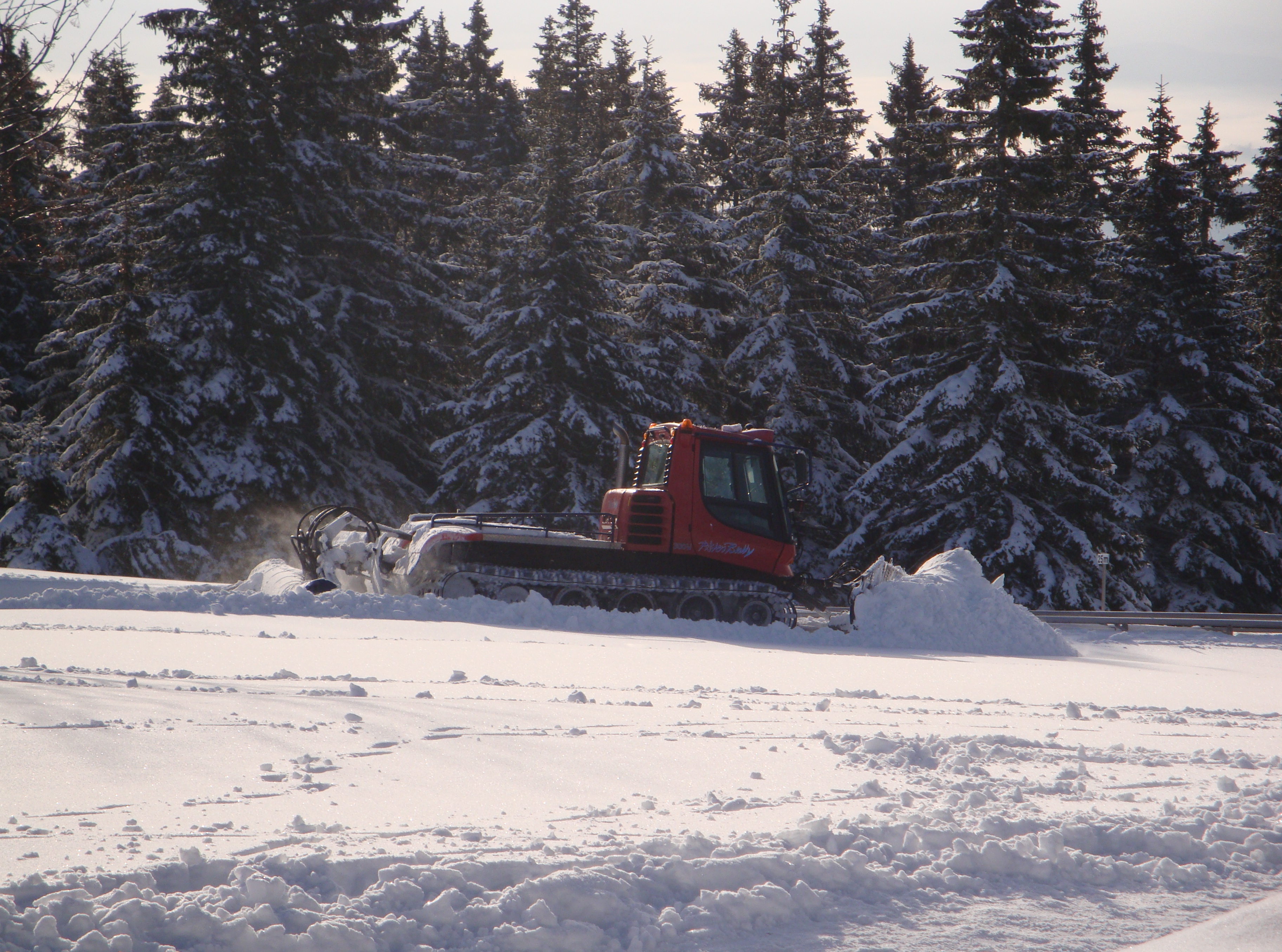 Teptalec na Rogli, Slovenija.